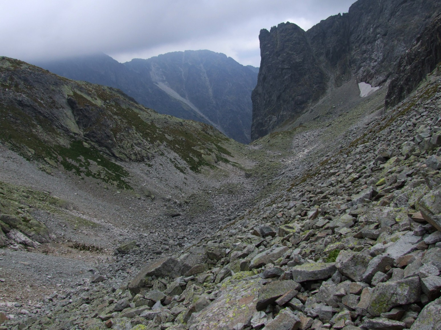 Lodowa Dolinka (odgałęzienie Doliny Małej Zimnej Wody w słowackich Tatrach Wysokich)